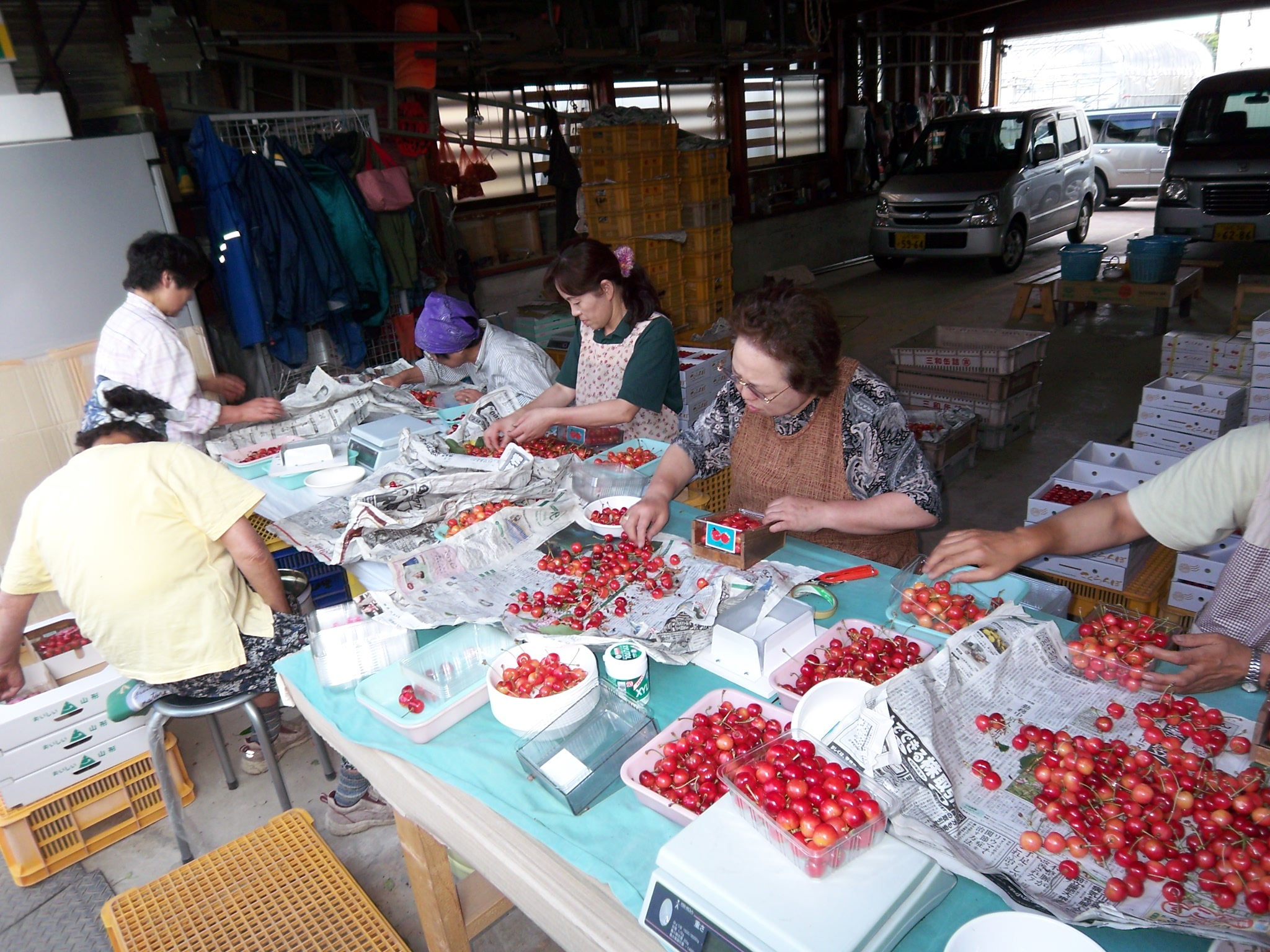 今年のさくらんぼ ２００８年のさくらんぼの出来。 さくらんぼは、気候の変化に敏感です。 2008/6/25 ２００８年は、５月初旬。さむく、受粉の出来が地域ごとに大きく異なっていました。 山形では、東根、寒河江が有名産地ですが、 さらに、その市町村のなかでも、また、違います。 寒河江市本楯（もとだて）では、出来もよかったようです。６月下旬。の写真です。 手詰め。特集。佐藤錦 手詰め。優。佐藤錦 朝、４時ごろから、朝もぎさくらんぼで、午後に発送しています。 朝に収穫すると、さくらんぼがみずみずしい状態で、おとどけできます。日をあびて、さくらんぼたちが起きるまえに収穫されるので、日持ちもよく（でも早めにたべたほうがおいしい）。いい状態でお届けできます。 朝もぎさくらんぼ がおすすめです。 今年（２００８年）は、東根市などのさくらんぼは、すでに、収穫がおわって（収穫高がすくなく供給ができない）で６月中旬で品薄状態でしたが、さがえは、まだまだ、最後のおいしい時期の収穫がつづいています。心配なのが、品薄のときには、粗悪な商品もランクを上げて、売ってしまい、山形のさくらんぼのイメージ自体がわるくなってしまうこと。数年まえのさくらんぼも、収穫出来がわるき、そのような品物が秀、特秀として店頭に並んでいたり、ネットで販売されていたりしたのをみかけた。 ■ 関連キーワード 朝もぎさくらんぼ 山形 佐藤錦 寒河江 いいさくらんぼとは